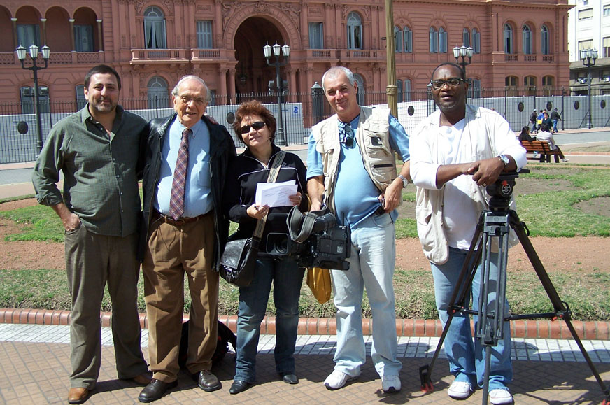 Equipe do Observatório da Imprensa diante da Casa Rosada, palácio presidencial em Buenos Aires, Argentina, 2002